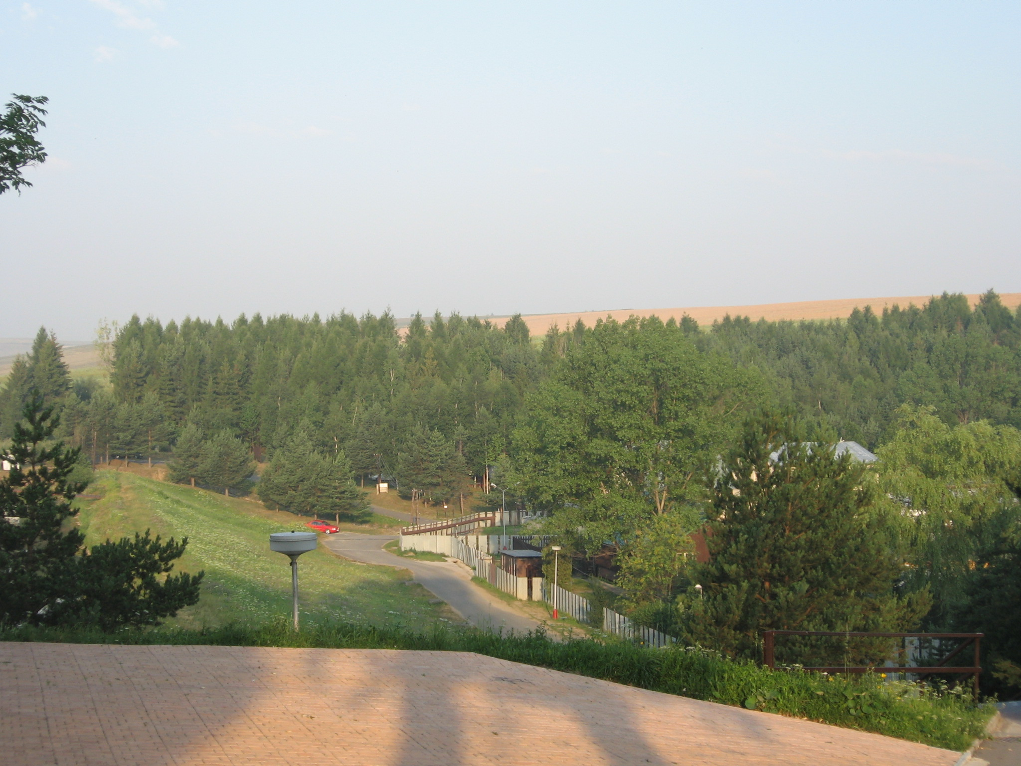 termálne kúpalisko s celoročnou prevádzkou